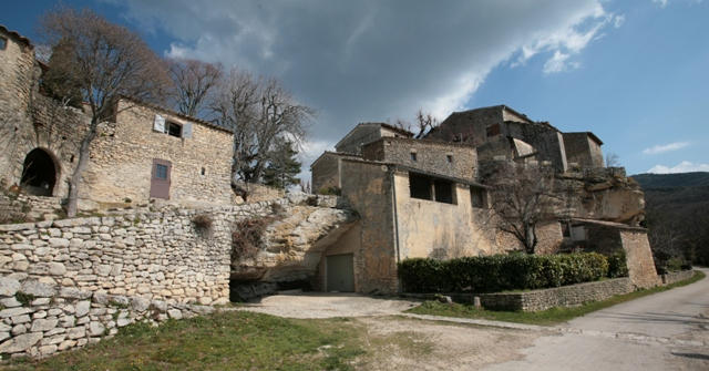 Le village de Sivergues, Vaucluse, France.